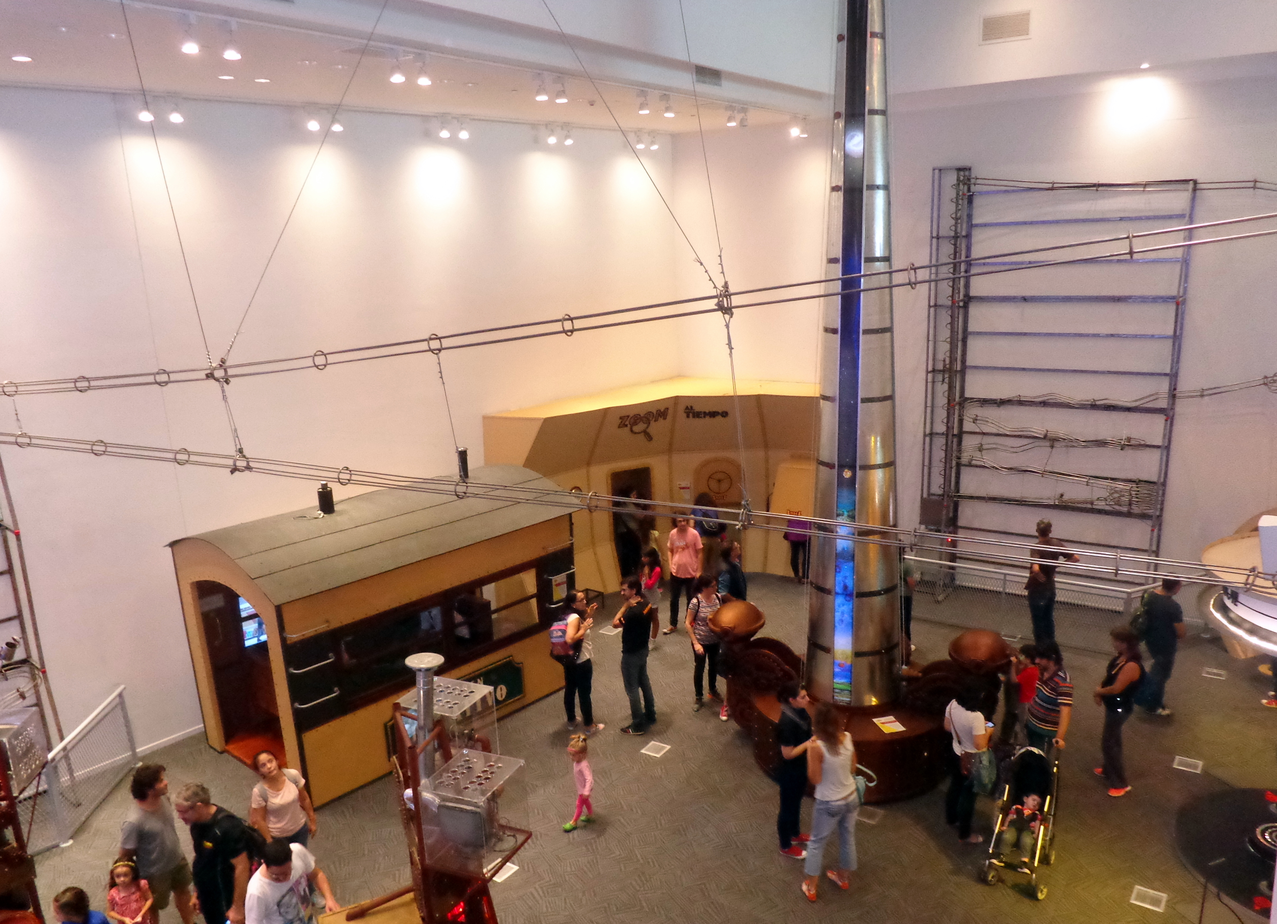 Centro Cultural de la Ciencia (C3), en el Polo Científico y Tecnológico, Buenos Aires, Argentina.